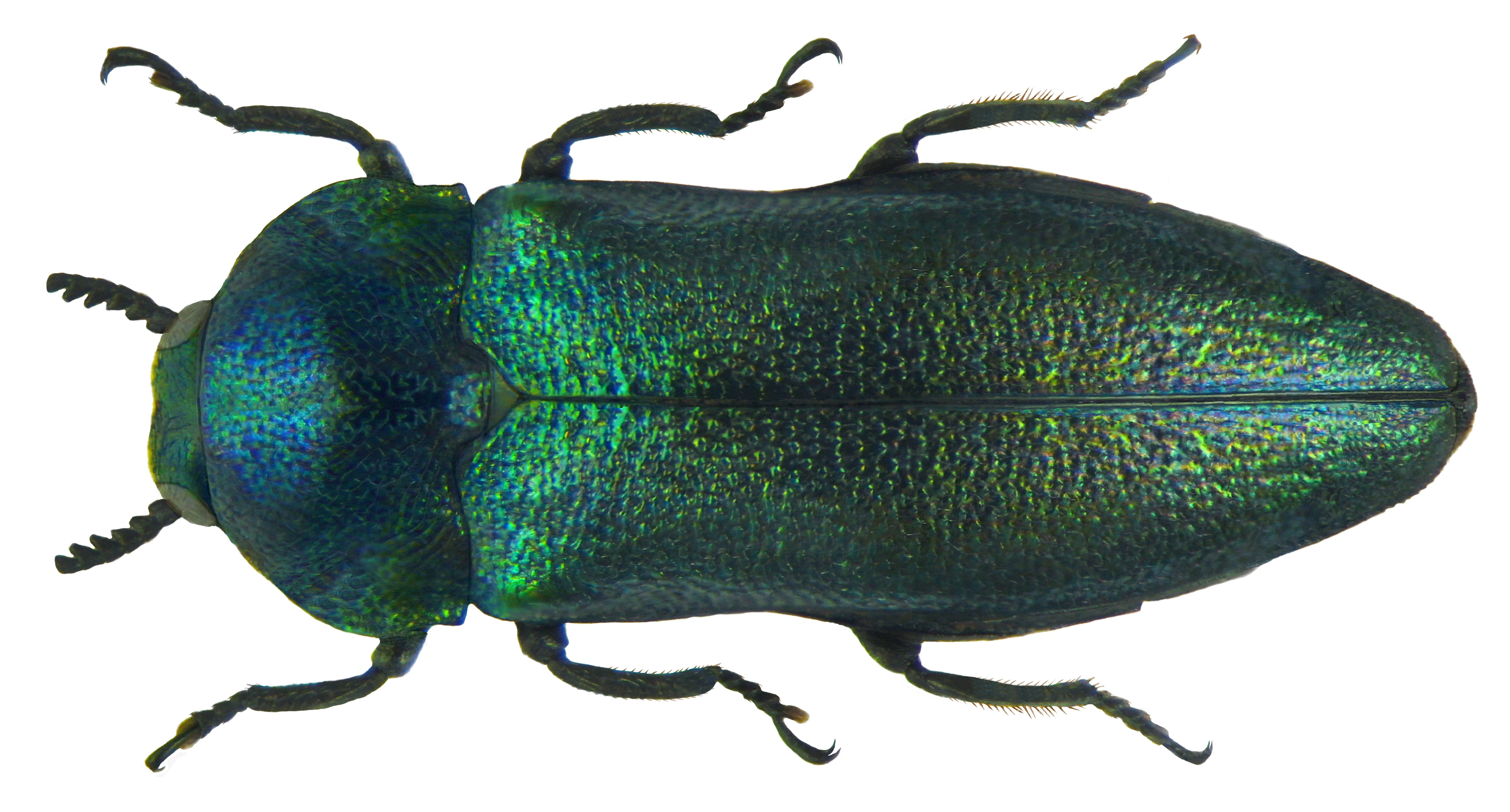 Familie: Buprestidae Groesse: 5,8 mm Fundort: Griechenland, Chalkidiki leg. det. H.Hebauer, 1986 Photo: U.Schmidt, 2011